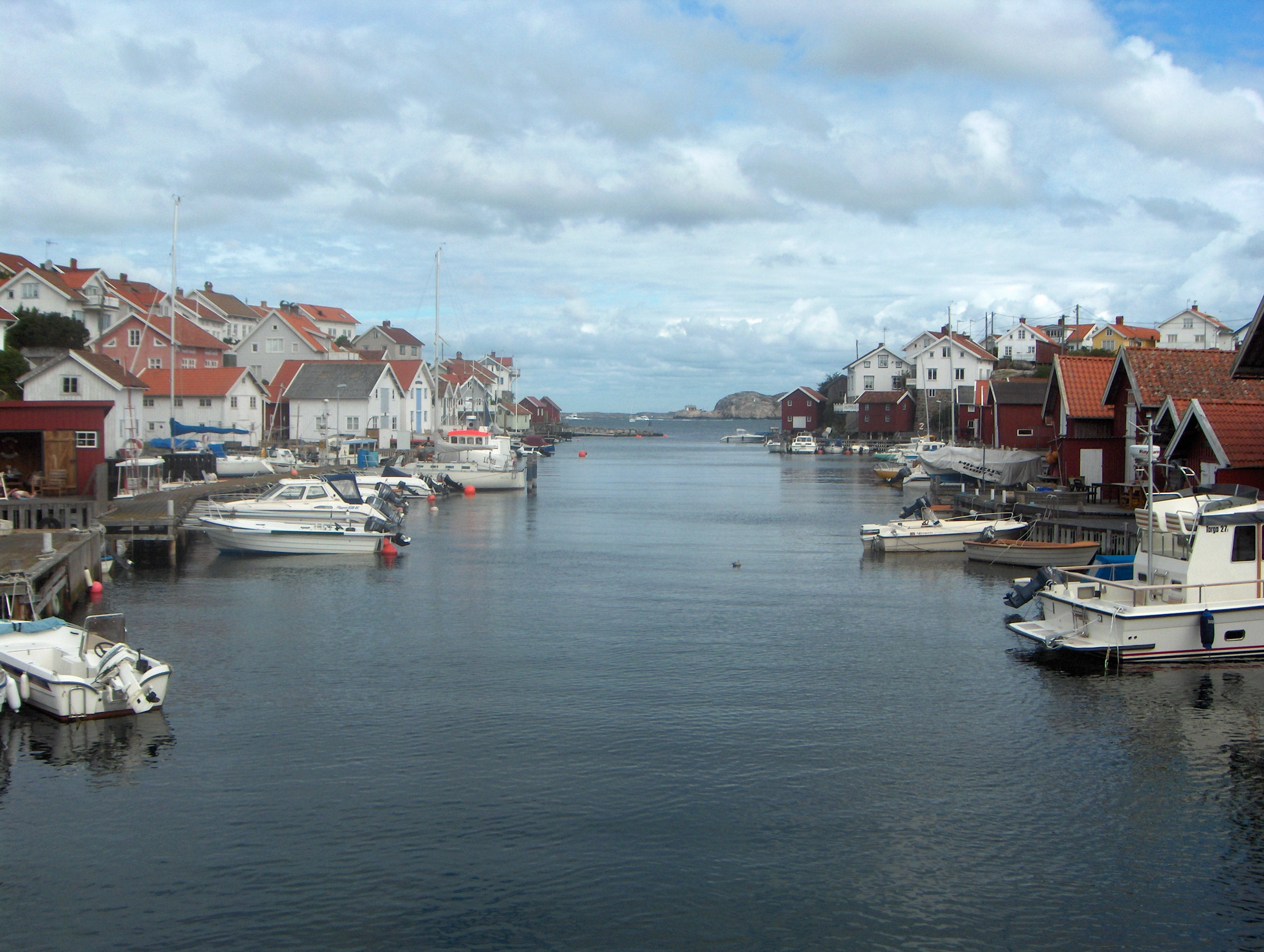 Gullholmen, Sweden